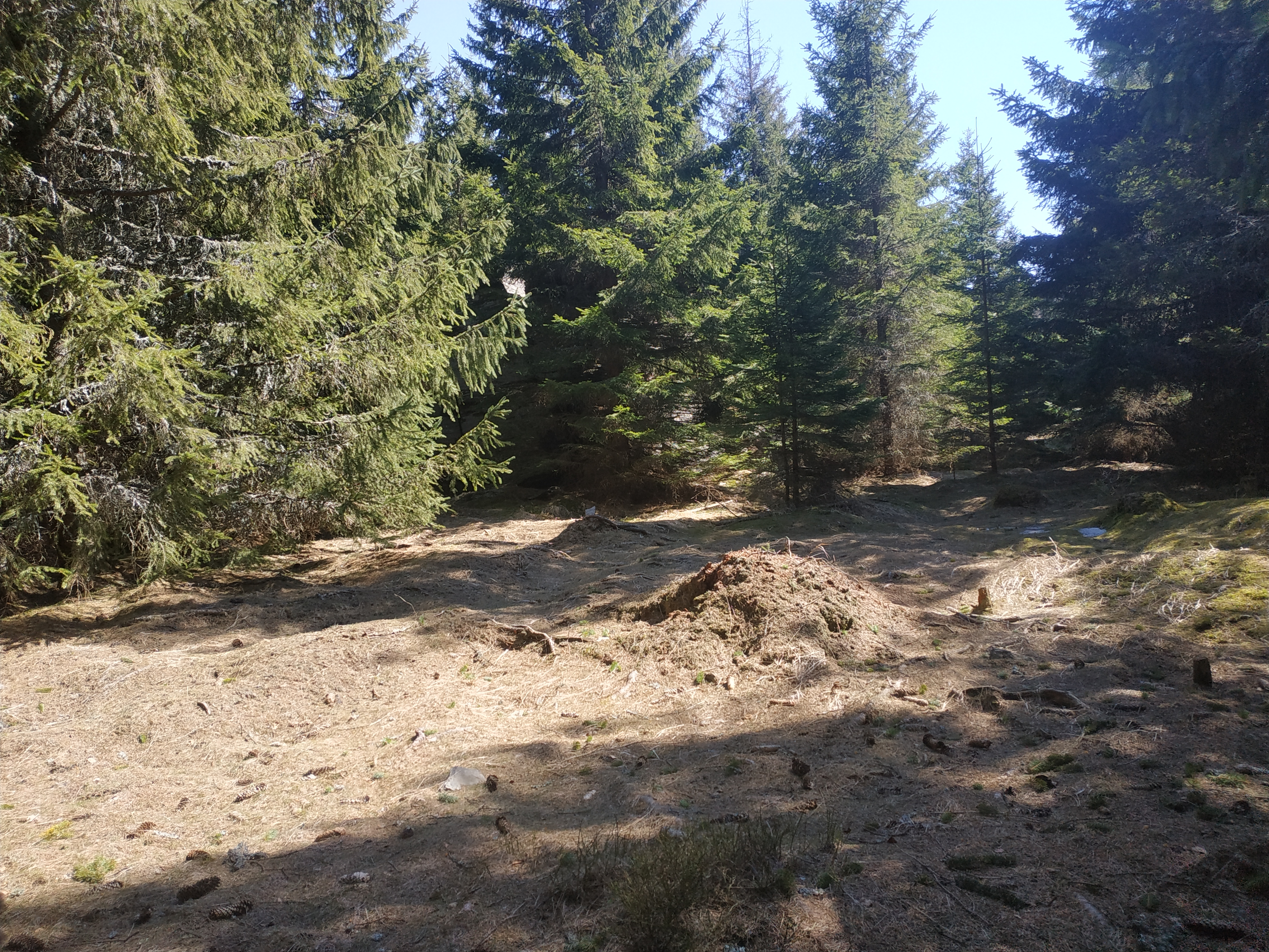 Pohled na mýtinu na vrcholu hory Plošina.